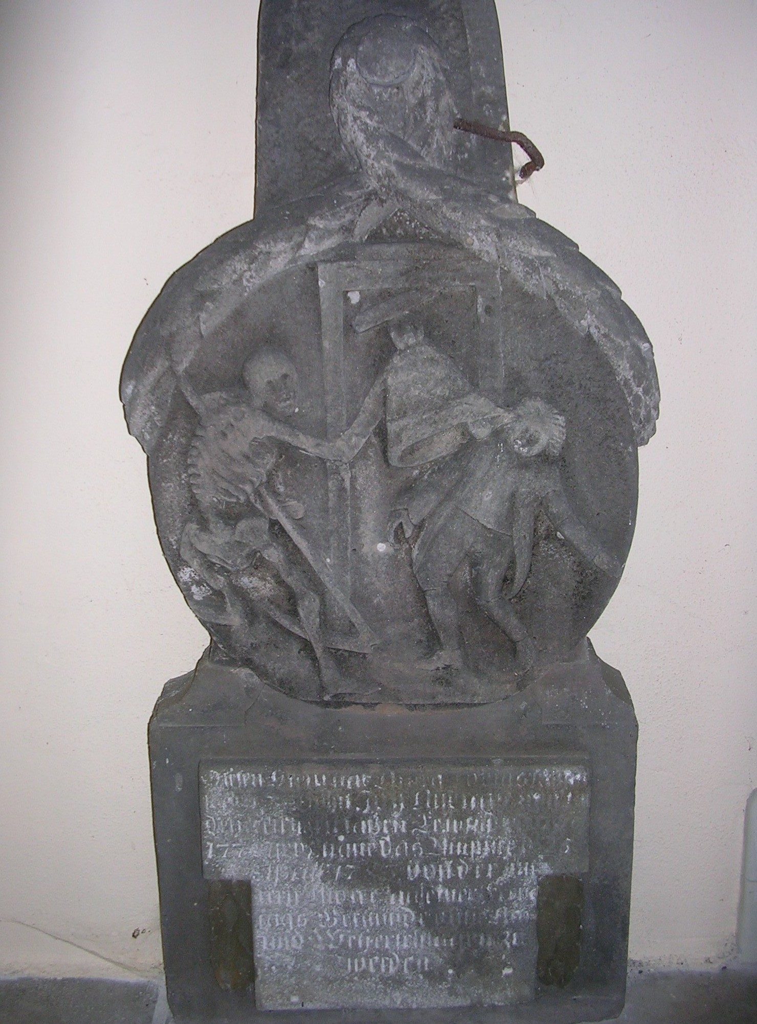 Grabstein des elfjährigen Andreas Kühn, wurde 1783 beim Läuten von einer Glocke erschlagen. Heute in der Kirche zu Nohra bei Weimar/Thüringen Vermutlich älteste naive Darstellung der Todesursache auf einem Grabstein in Thüringen